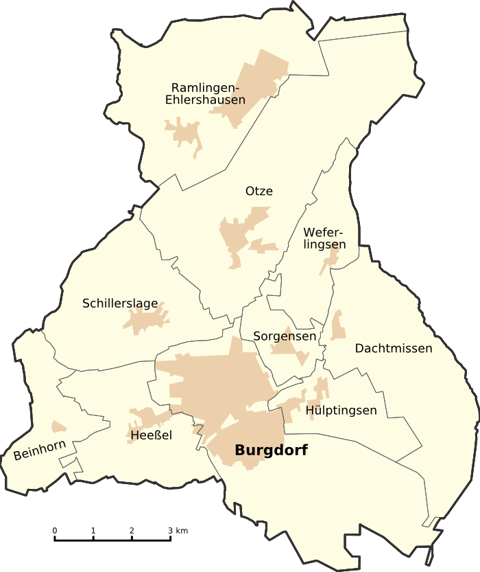 Karte der zehn Ortsteile der Stadt Burgdorf.